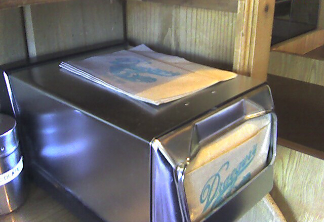 Napkin dispenser